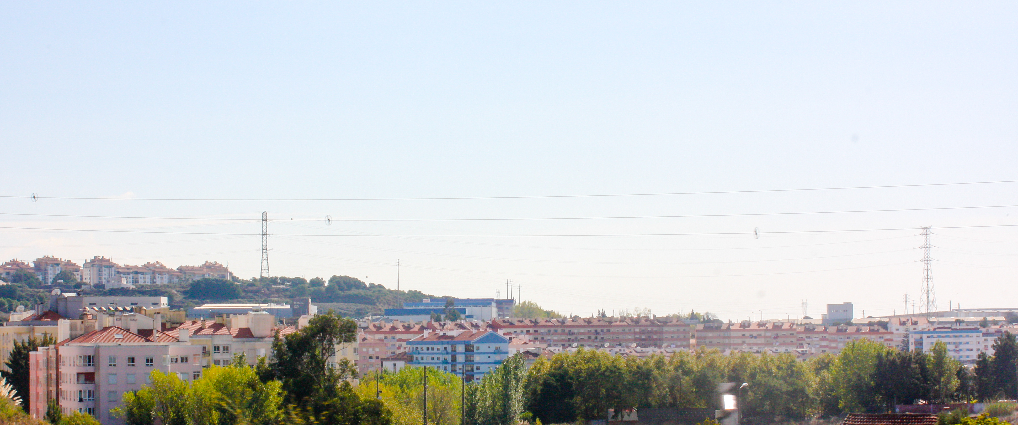 Panorama da cidade.